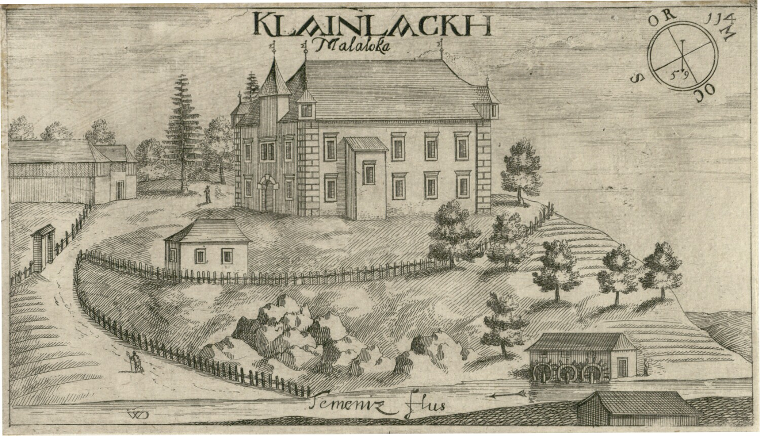 Dvorec Mala Loka